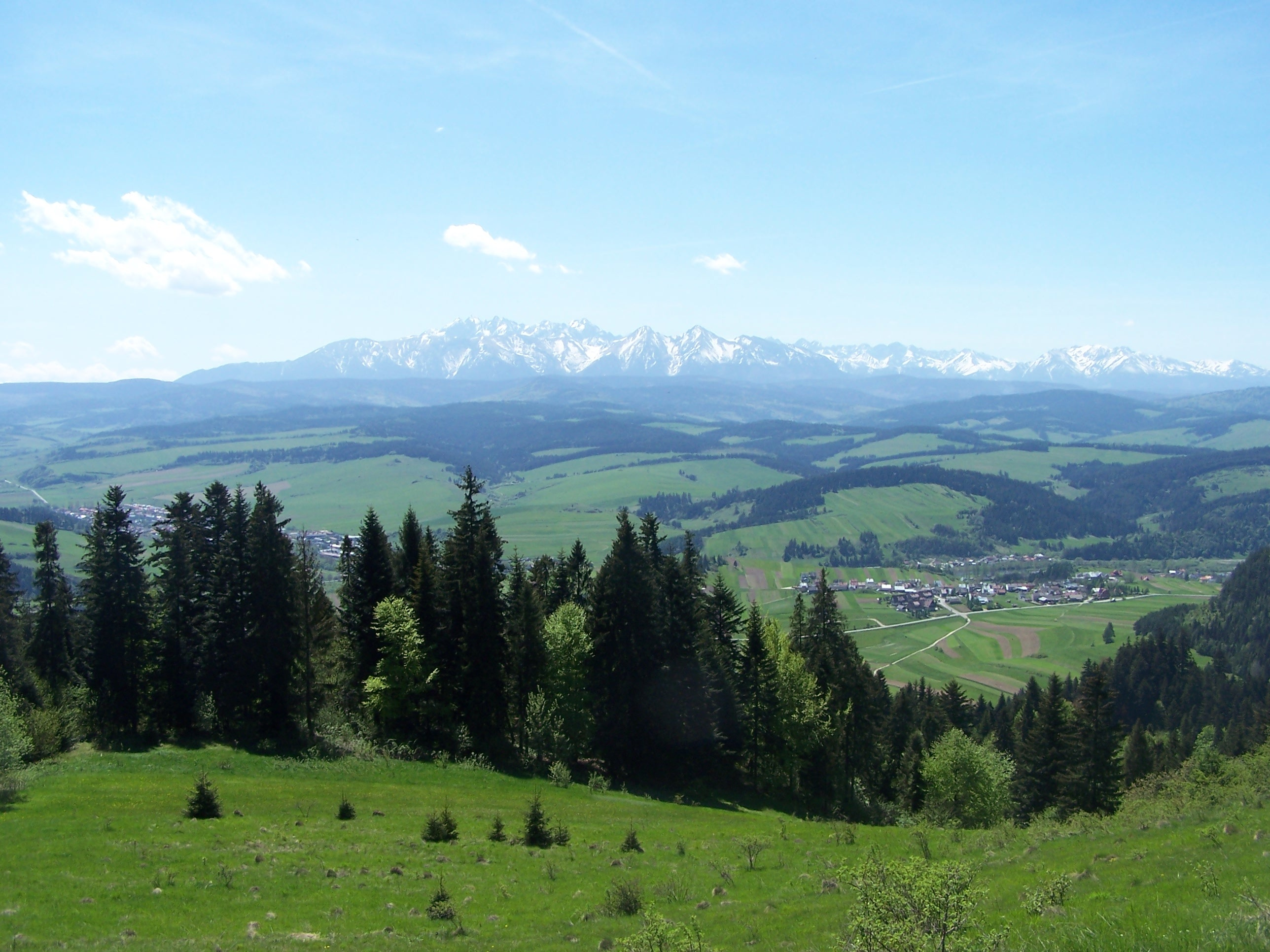 Widok z grzbietu Suszyny w Pieninach Czorsztyńskich